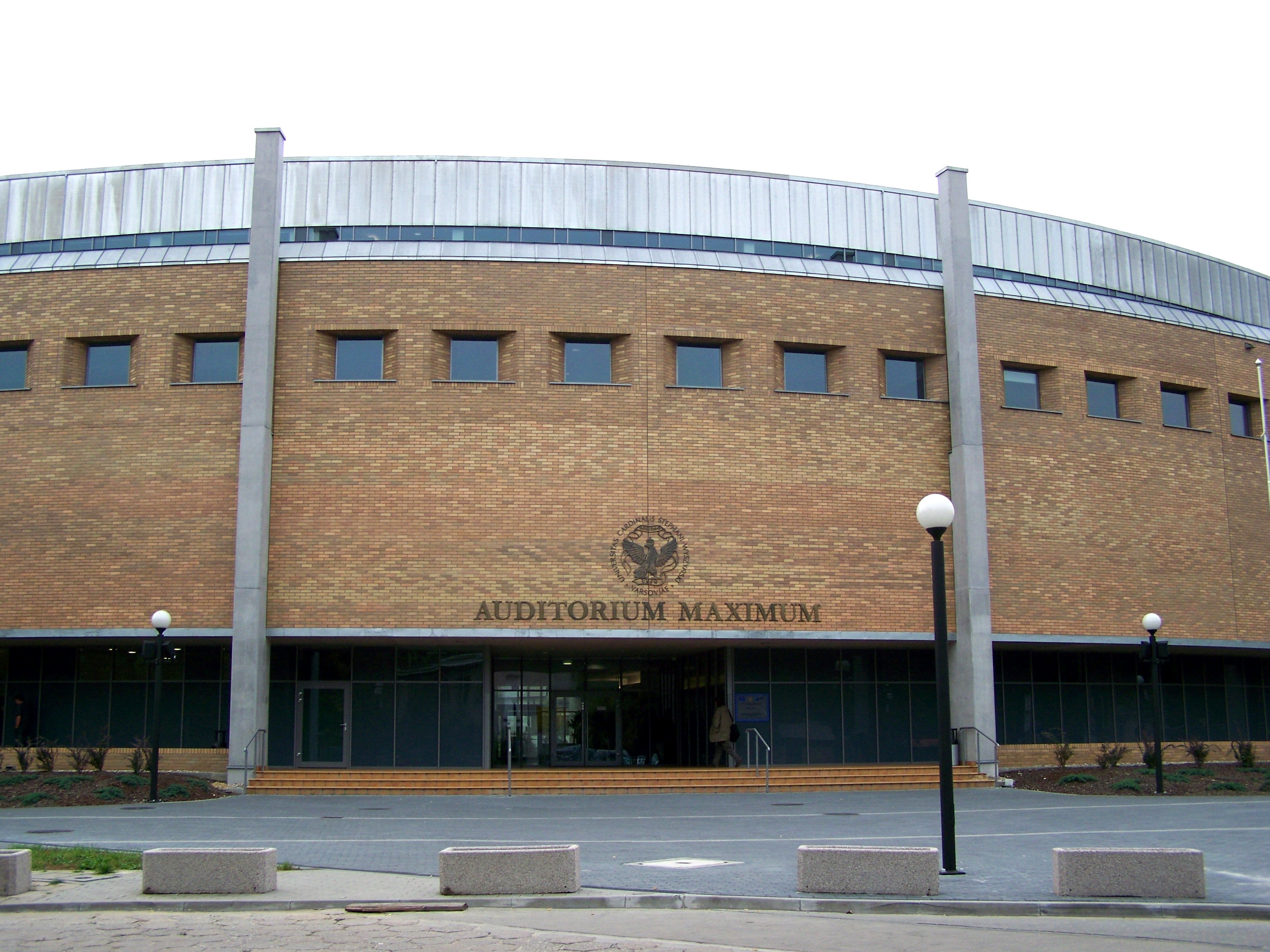 Wejście do nowego budynku UKSW na warszawskich Bielanach przy ulicy Wóycickiego